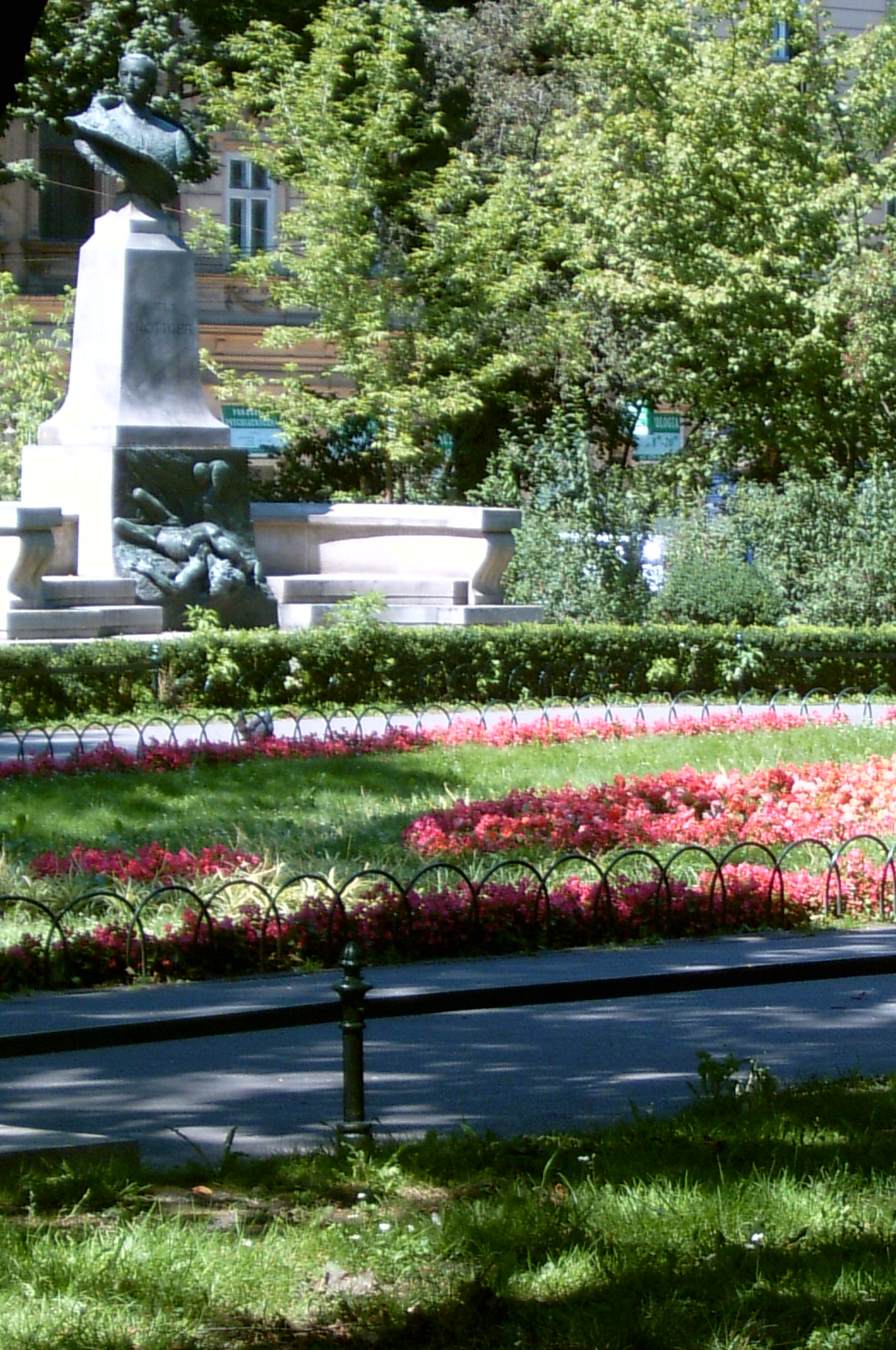 Kraków, Poland